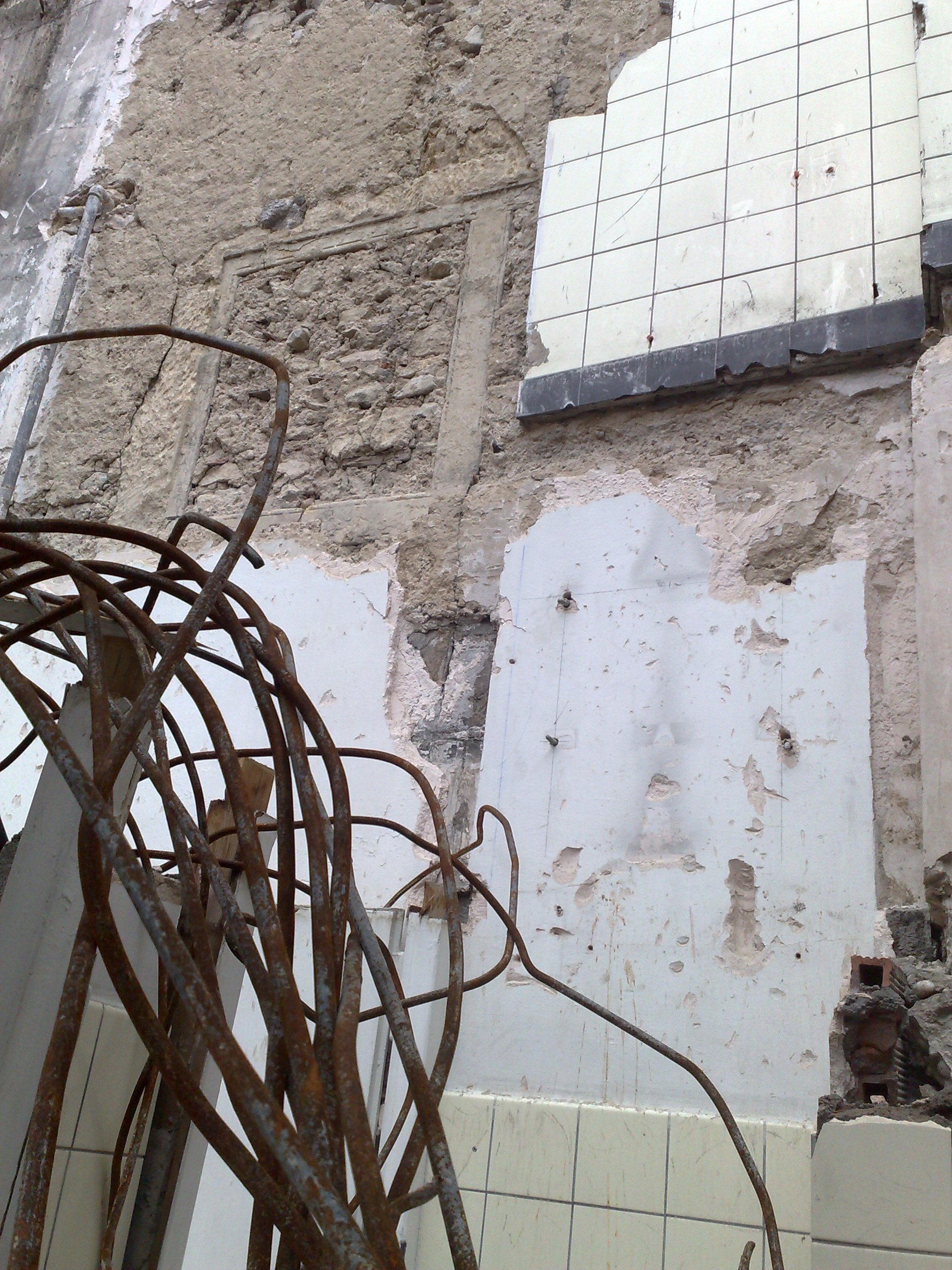 fenêtre à meneaux mise à jour lors des travaux à l'arrière du 6 place des Charrons, Metz